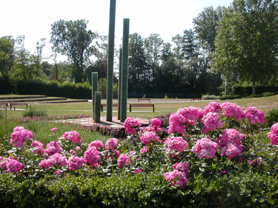 Jardin de l'Illiade. Auteur: Quedza Date: 23.6.2006 (cliché et redimension)